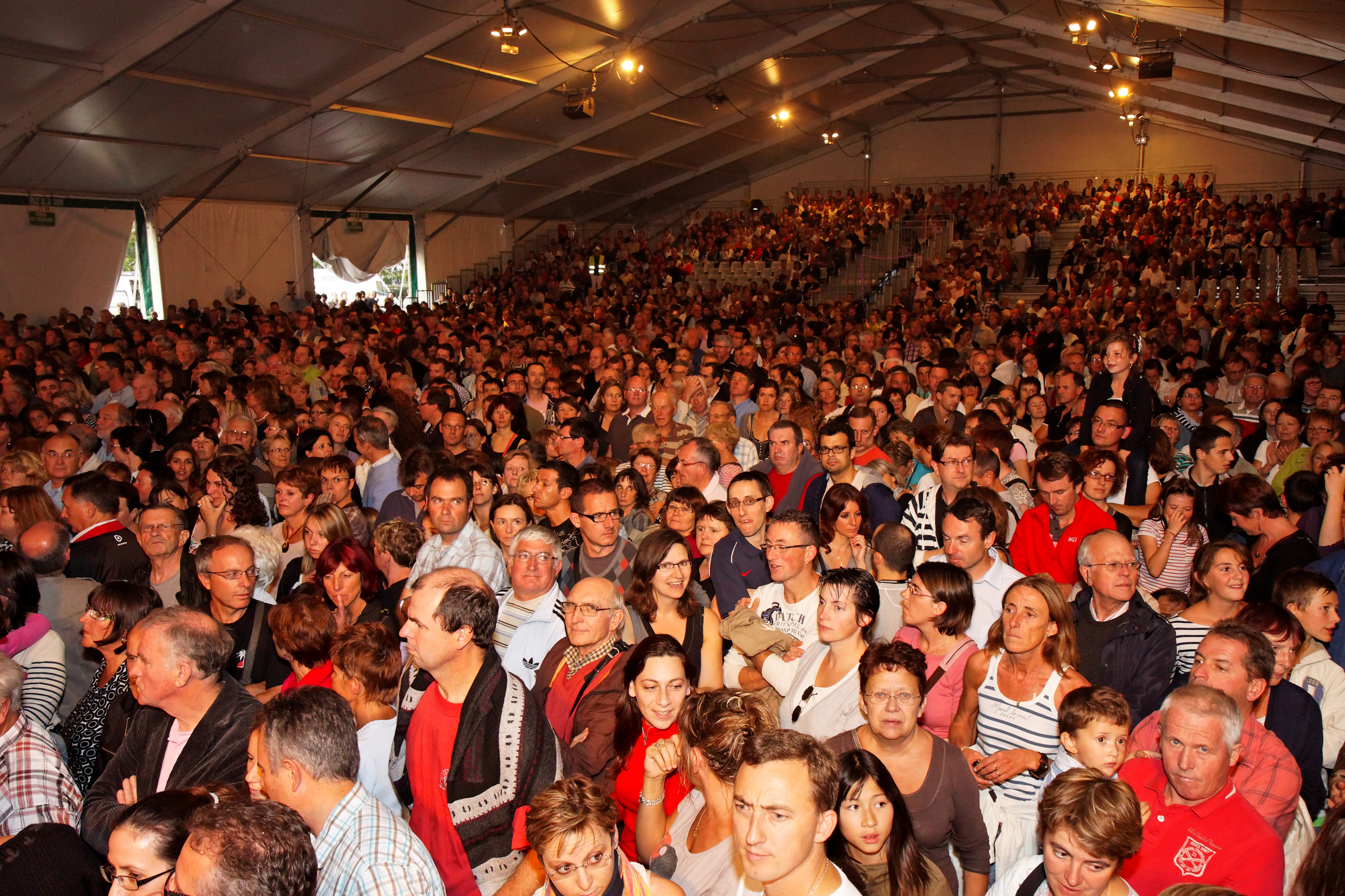 Les spectateurs lors du concert de Nolwenn Leroy le 22 juillet lors du festival de Cornouaille 2011.